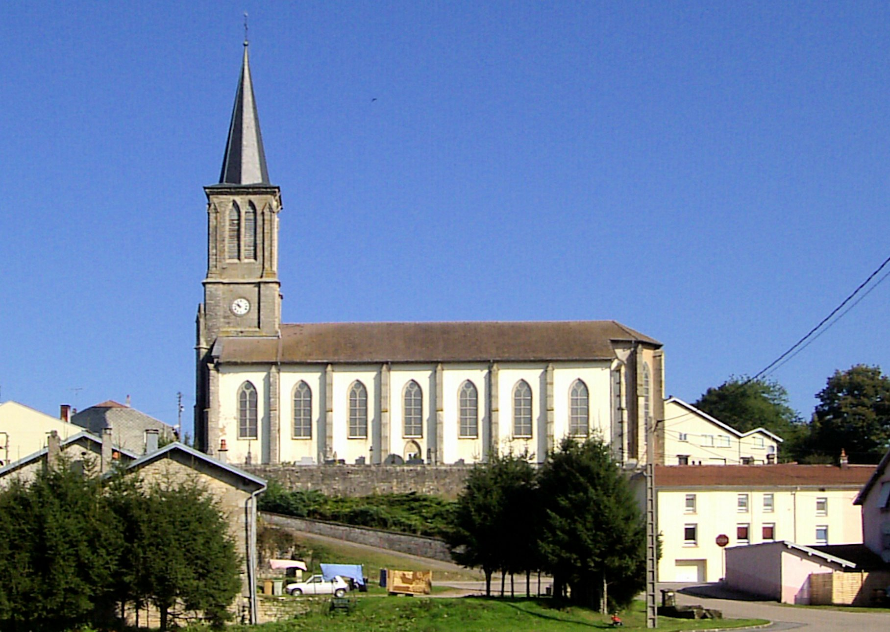 L'église Sainte-Madeleine d'Uzemain